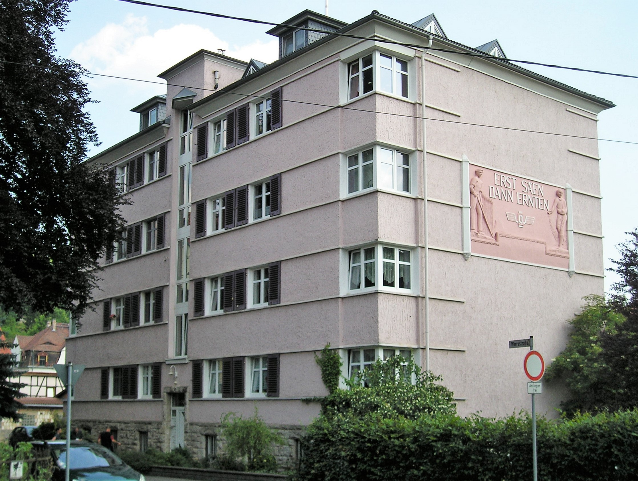 Wohnhaus in Meiningen - Erst säen, dann ernten